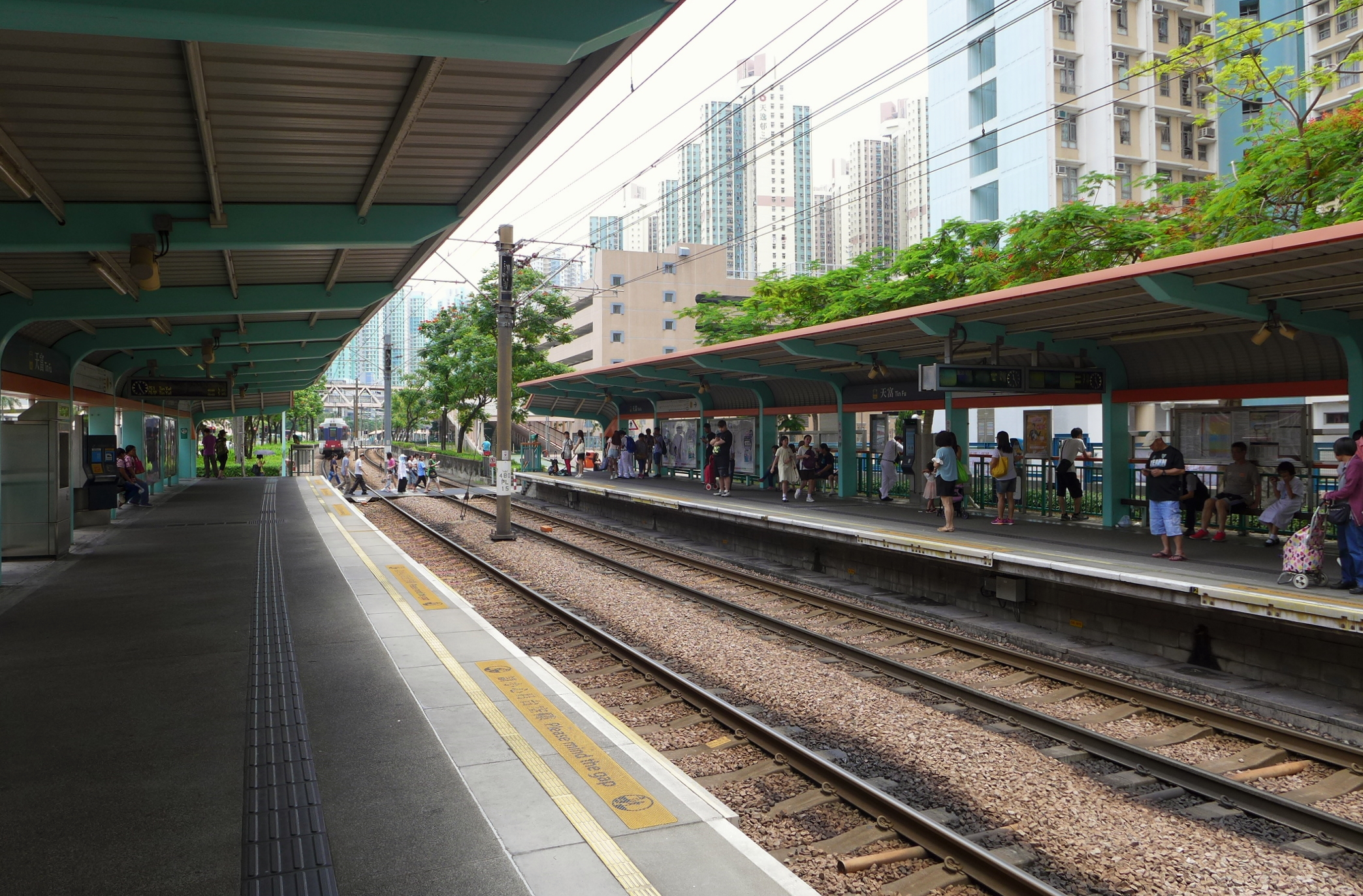 Tin Fu Stop